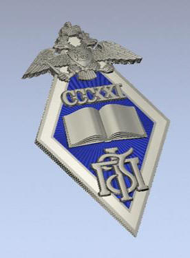 Исторический нагрудный знак «Гордость школы» образца 2015 года, которым награждаются лучшие учащиеся школы № 321 Санкт-Петербурга. Представляет собой изделие ювелирного качества традиционной ромбовидной формы (37Х15), выполнен из серебра 925-й пробы, покрыт горячей эмалью, имеет цанговое крепление. Элементы, составляющие лицевую часть знака: вверху – двуглавый орёл (автор данного вида изображения – выпускник школы периода Первой Санкт-Петербургской гимназии художник И. Я. Билибин); внизу логотип – вензель Первой Санкт-Петербургской гимназии (элемент знаков 1916 и 1925 года); в центре – раскрытая книга (часть современной эмблемы школы) – символ учения; над книгой – связующий элемент эпох – римская запись номера школы современного исторического периода. Элементы на оборотной стороне знака: гравировка фамилии и инициалов награждённого, год вручения. К знаку прилагается удостоверение установленного образца.